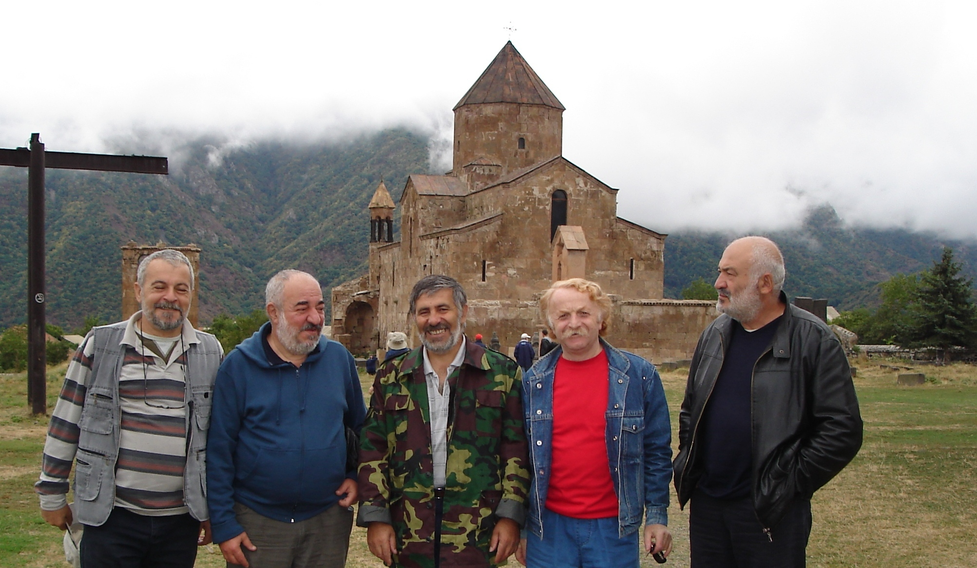 Լոռվա Ձոր